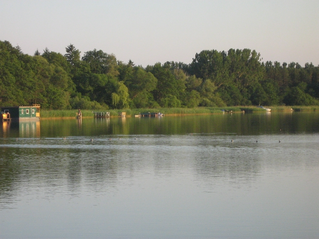 Der Müritzarm ist ein Teil des Oberlaufes der Elde und verbindet die "Kleine Müritz" mit dem "Müritzsee" bei Priborn (Landkreis Mecklenburgische Seenplatte, Mecklenburg-Vorpommern, Deutschland)